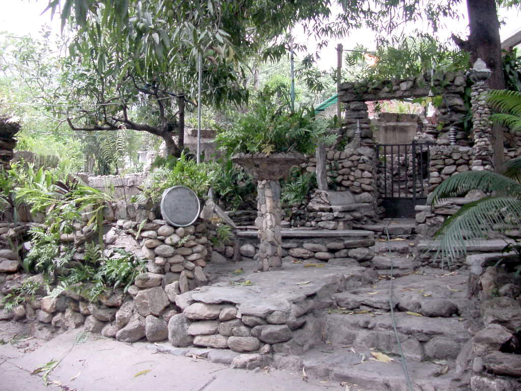 Museo de Las Piedras, en la vivienda de la familia Rojas - Colina. Construida por Gregorio Rojas "Rojíta" (+) y su familia en Callejón La Cañada - Sector Niño Jesús - El Limón